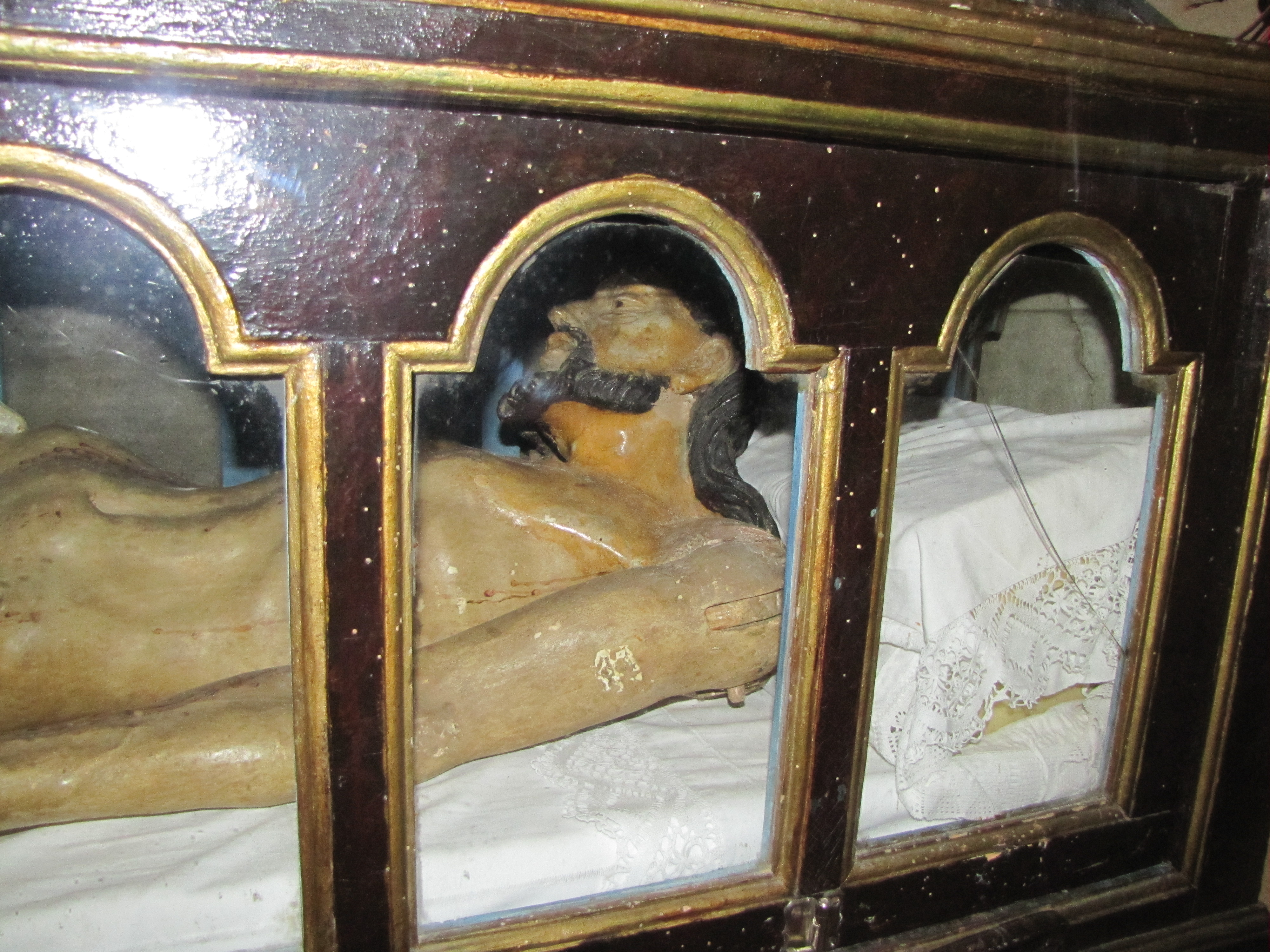 Santo Sepulcro. Seron de Nagima.